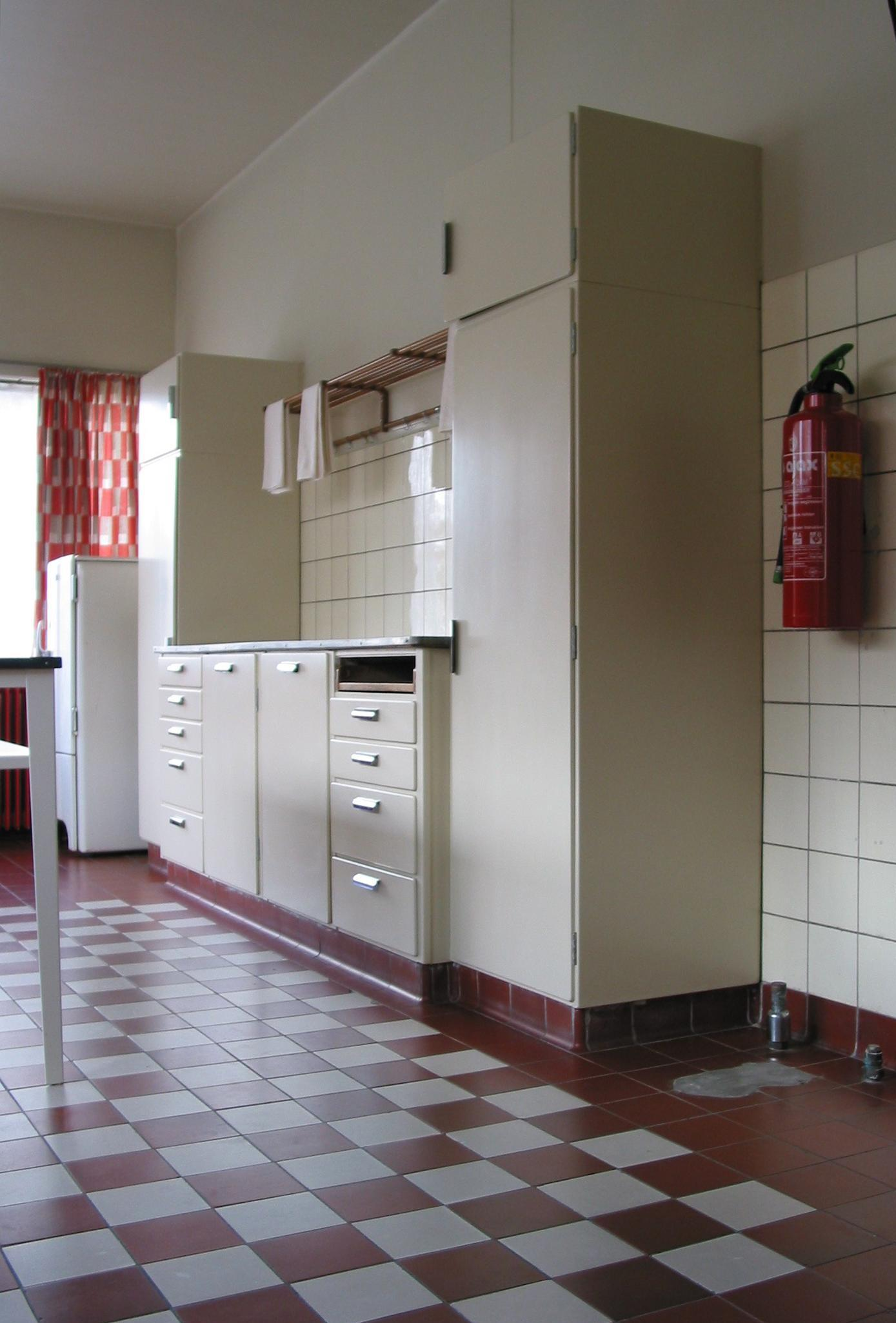 Bruynzeel kitchen, designed by Piet Zwart. '30s. In situ Sonneveld House, Jongkindstraat, Rotterdam.